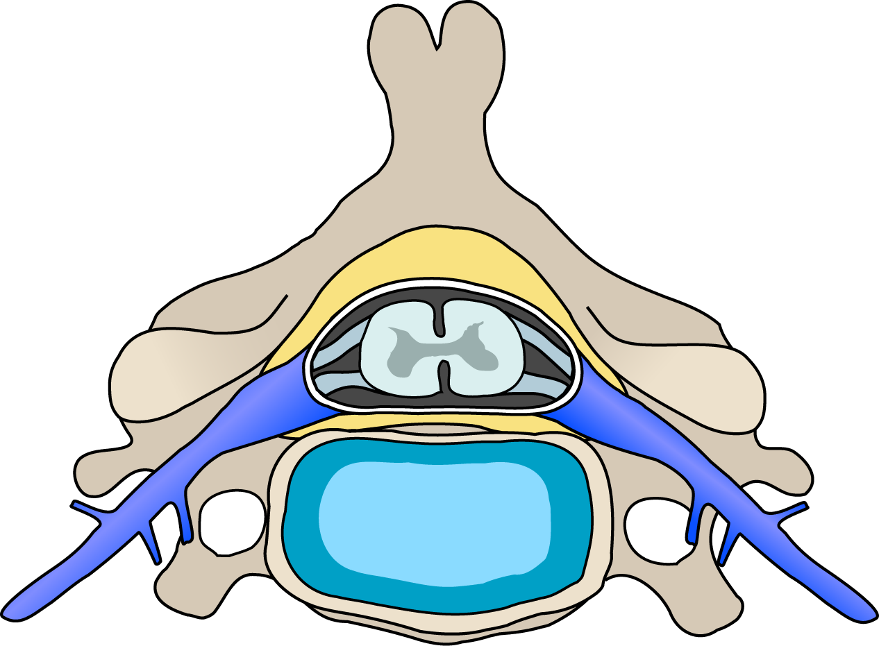 unannotated diagram of cervical vertebra